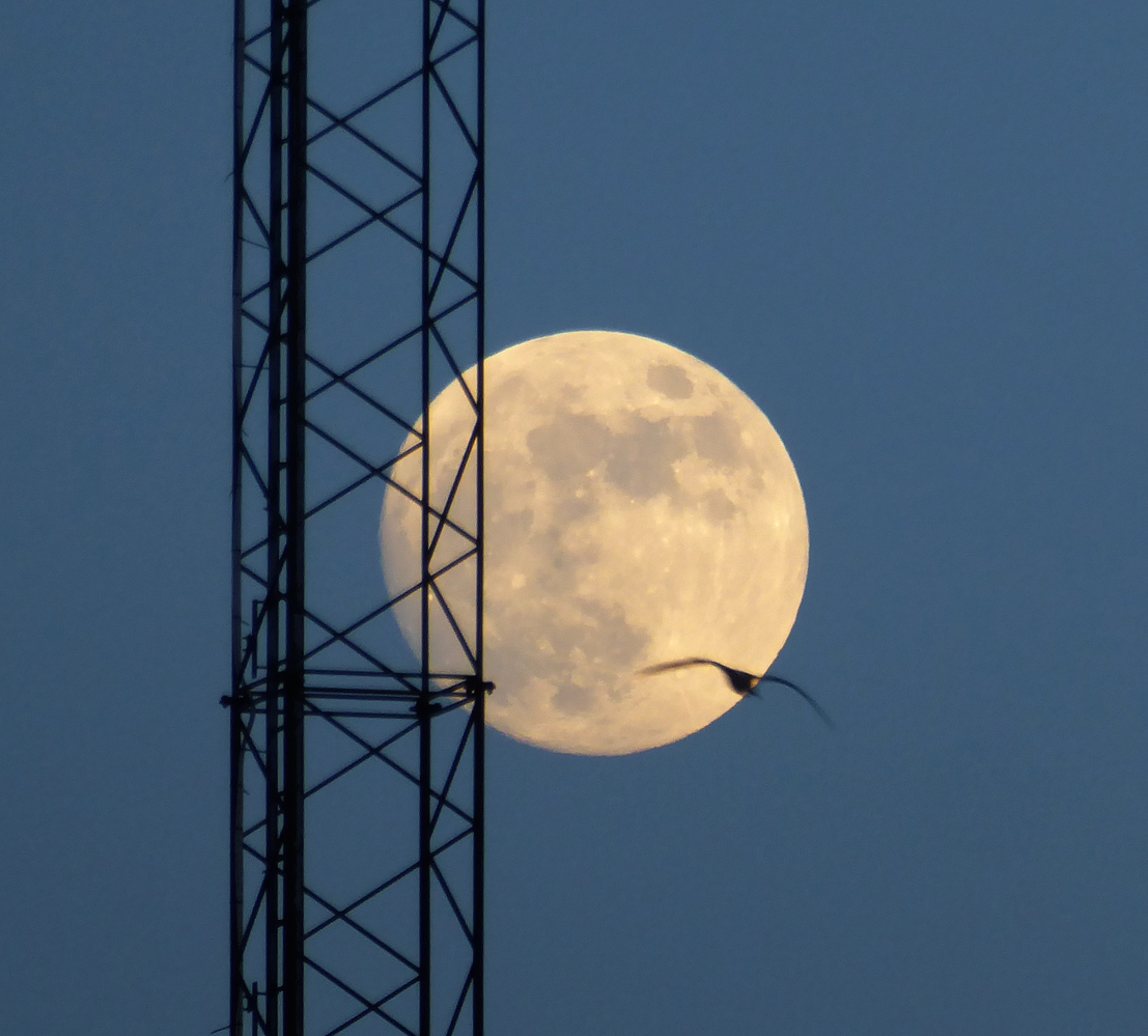 Fullmåne i Ystad 30 jan 2018.